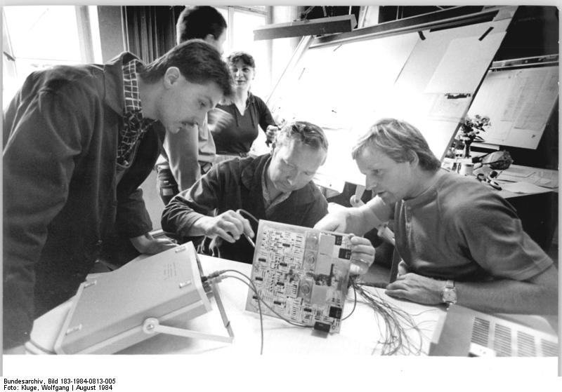 VEB Polygraph Druckmaschinenwerke Leipzig ADN-ZB Kluge 13.8.84 Leipzig: Elektronische Baugruppen steuern künftig die seitliche Ausrichtung der Druckpapierbahnen auf der Rollenrotations-Offsetdruckmaschine "zirkon forta" aus dem VEB Polygraph Druckmaschinenwerke Leipzig. Durch diese Weiterentwicklung, die auf der bevorstehenden Leipziger Herbstmesse erstmals gezeigt wird, erhöht sich der Bedienkomfort der Maschine. Das neue elektronische Steuerungsteil entwickelte ein Jugendforscherkollektiv des Betriebes, zu dem Musterbauschlosser Michael Kunert, die Konstrukteure Steffen Hartrampf und Kersten Hauer, Elektriker Dietrich Kertscher und Entwicklungsingenieur Friedrich Richter, Leiter der Gruppe, gehören.